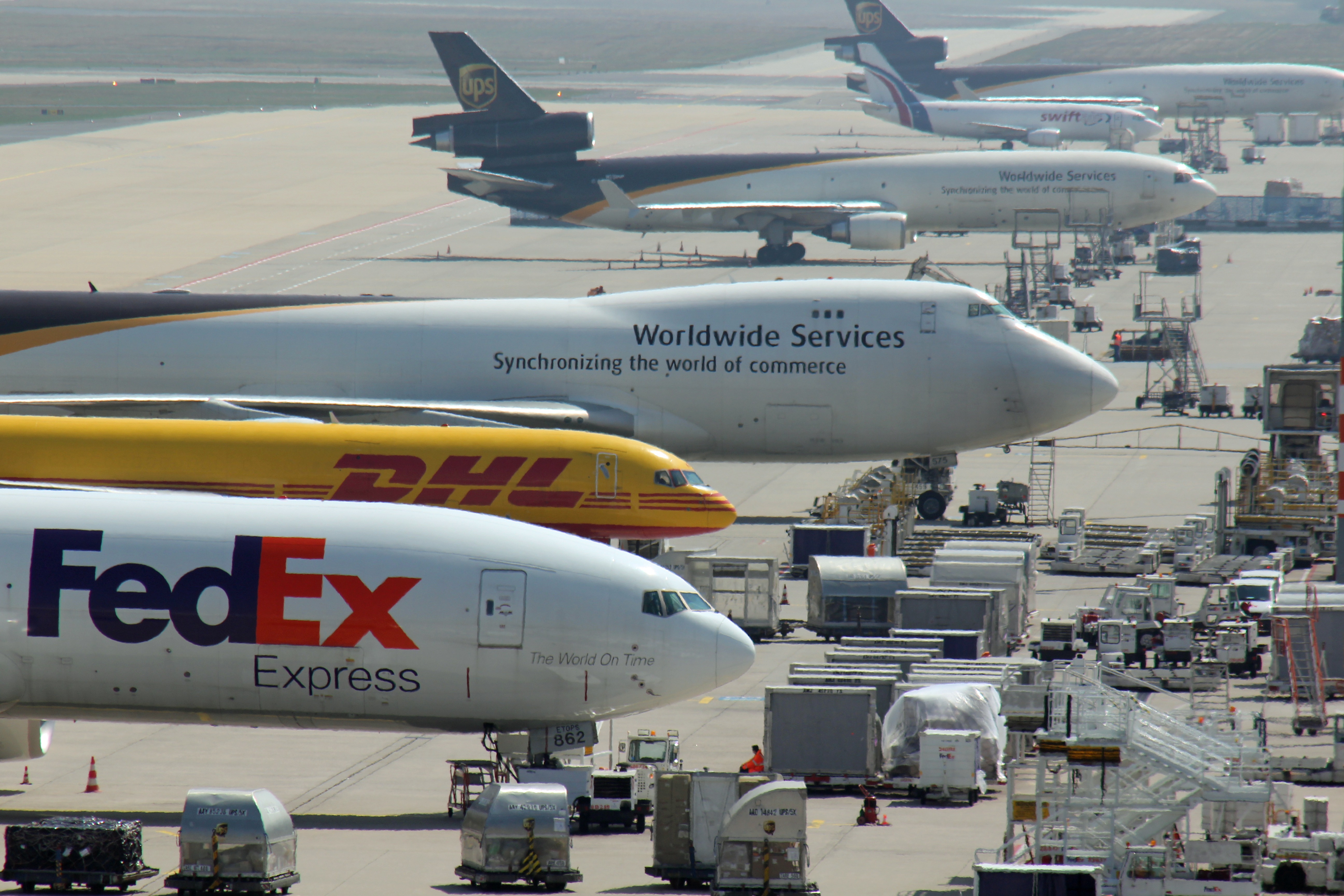 Luftfrachtbereich am Flughafen Köln-Bonn